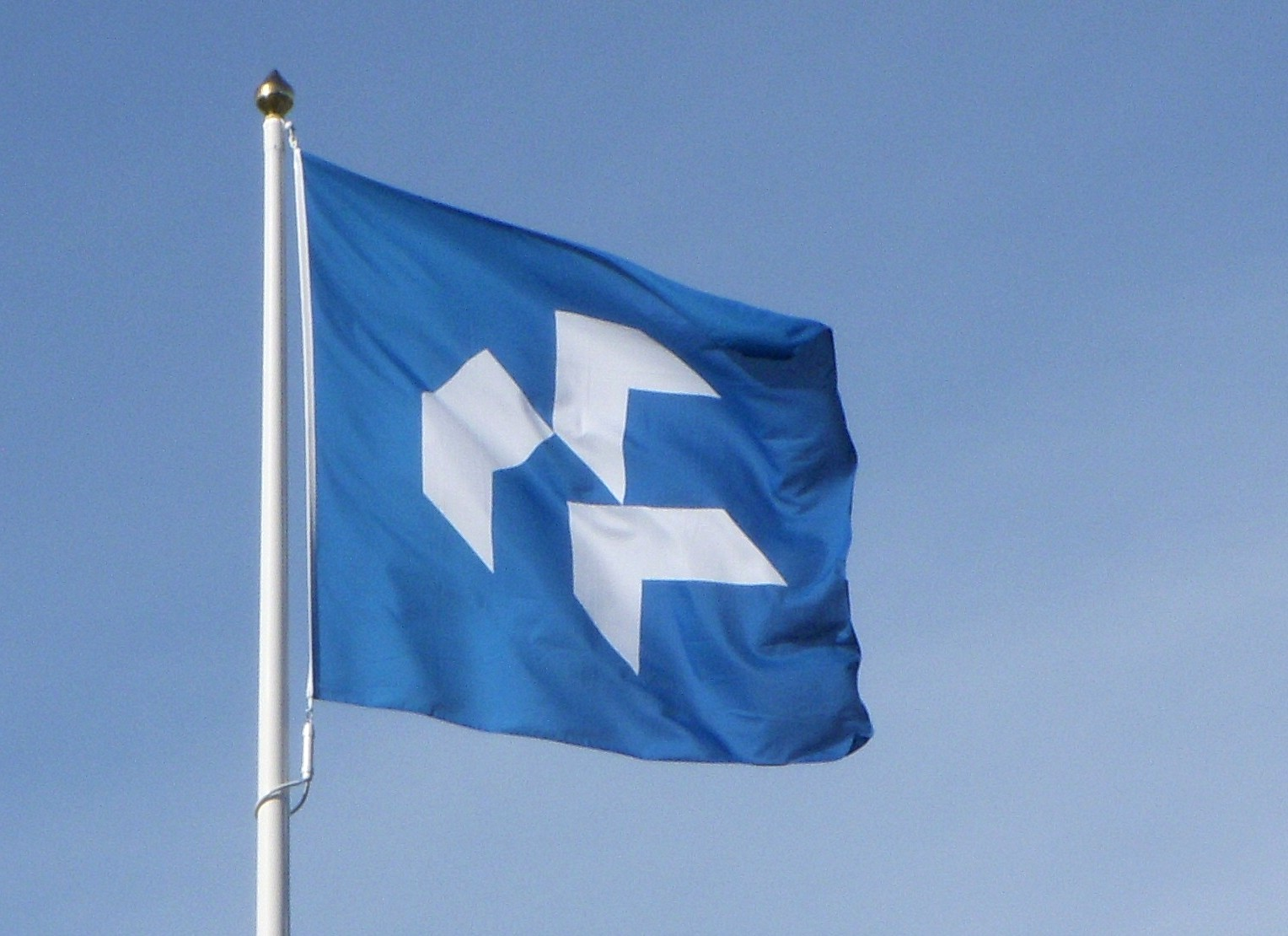 Huge fastighets AB